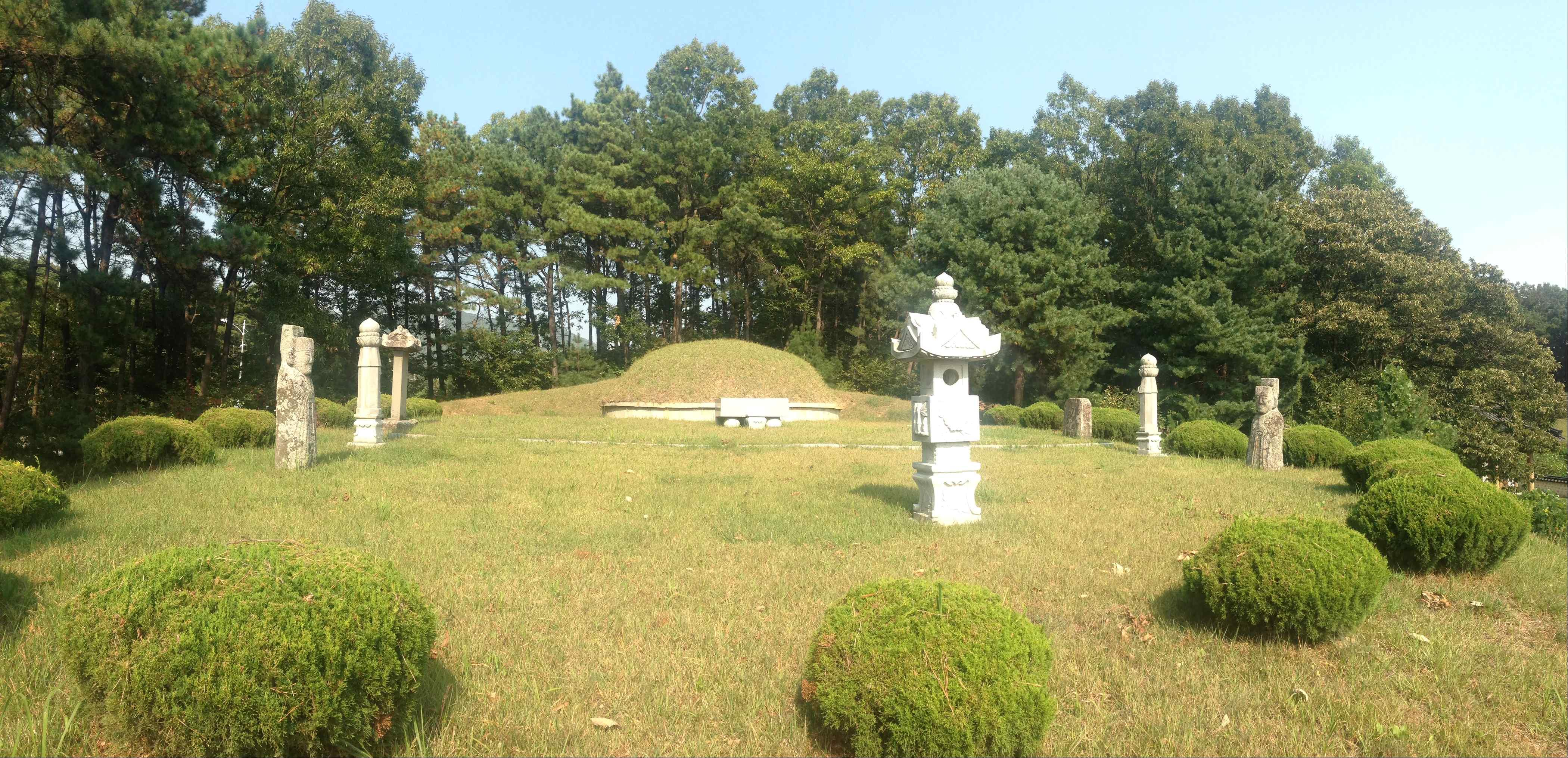 이천시 향토유적 제23호